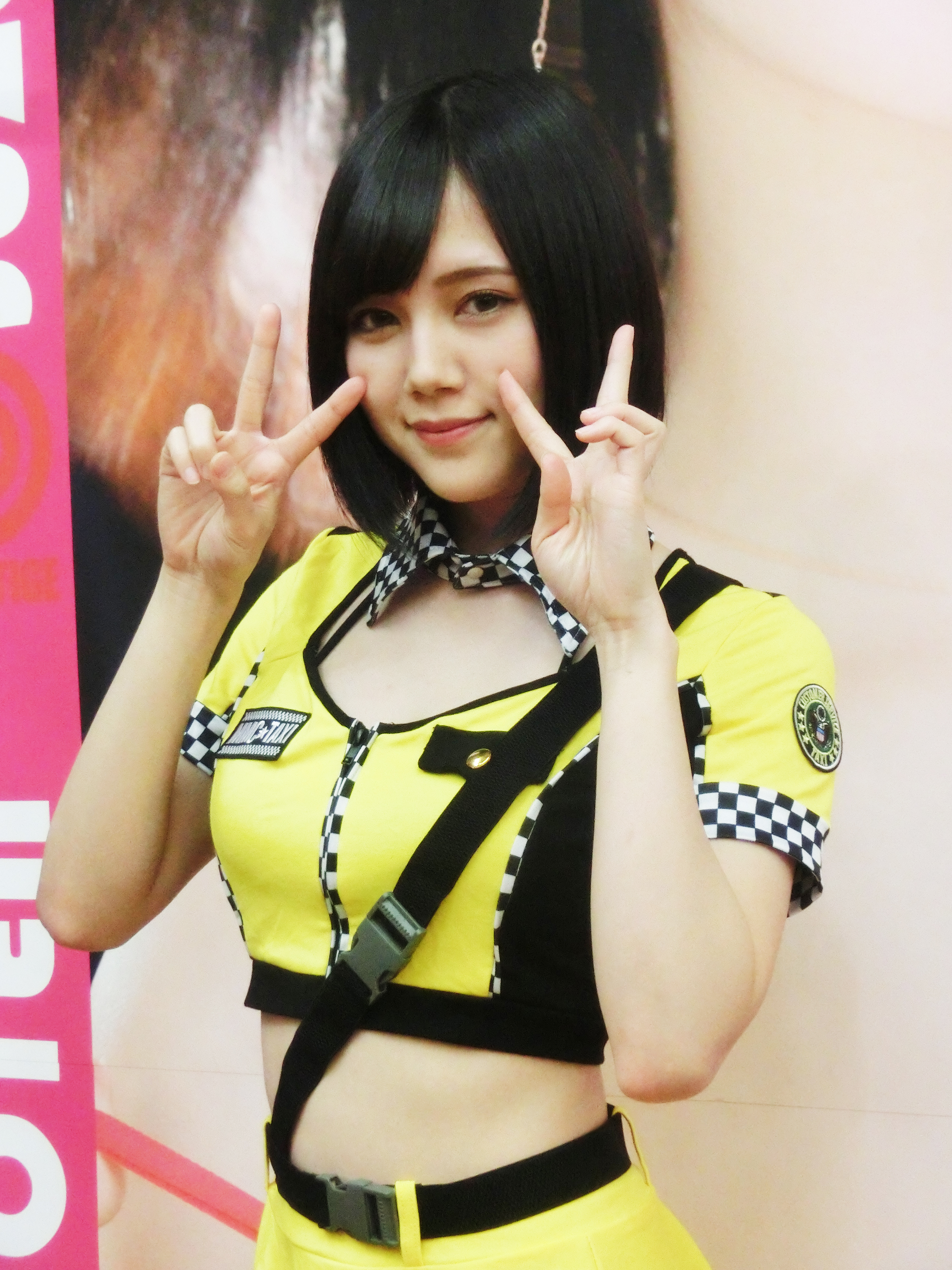 神田書店野田店イベント会見